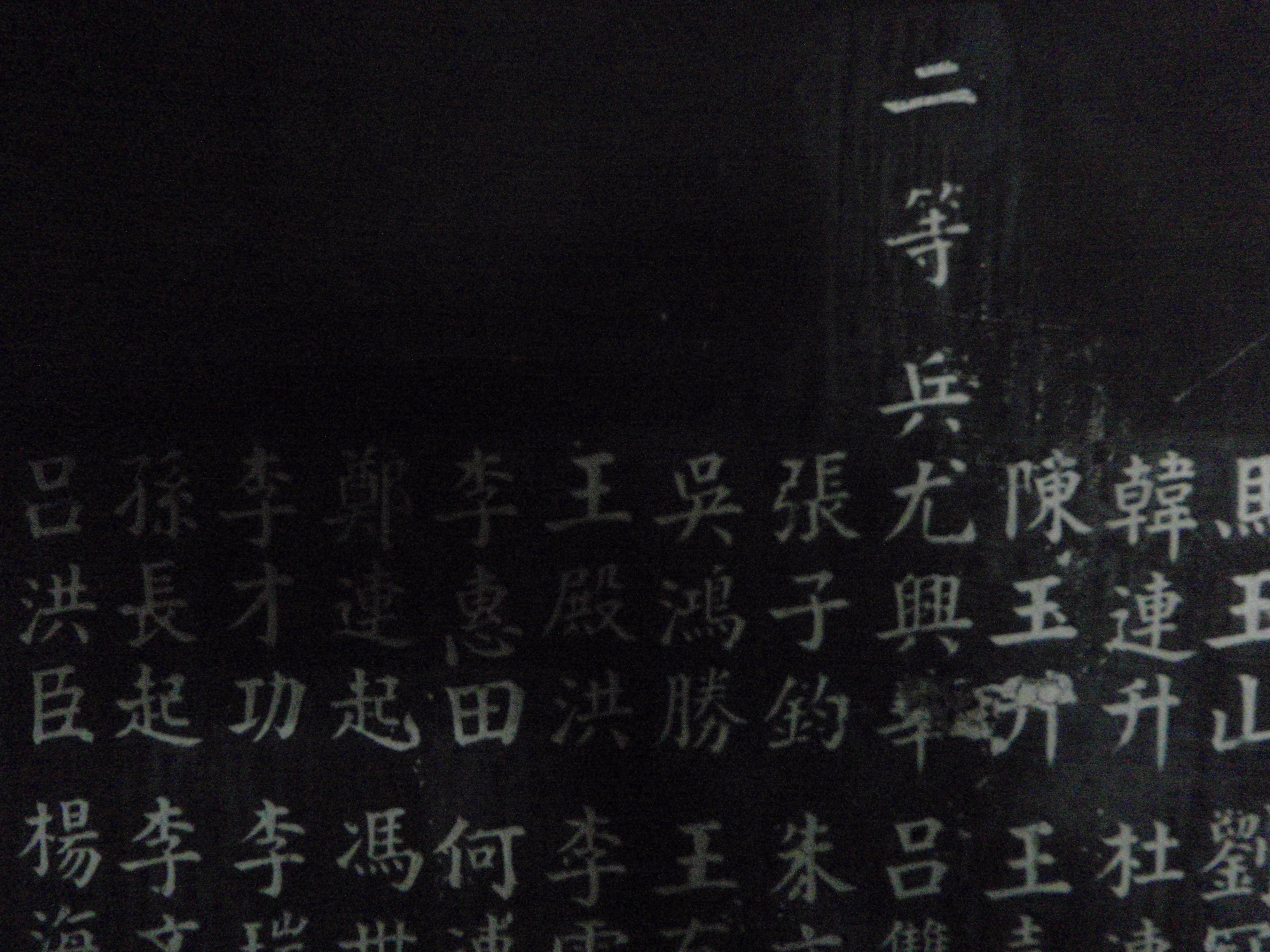 南京无梁殿，阵亡将士名录（局部）